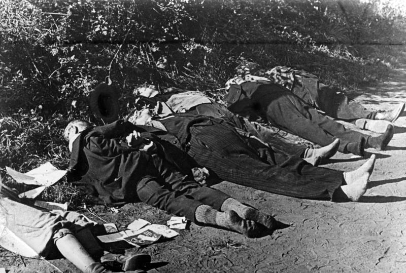 Bromberg, Leichen getöteter Volksdeutscher Zu den bestialischen Geiselmorden in Bromberg Scherl Bilderdienst, Berlin 7.9.39 [Herausgabedatum] 11273-39 18 am Bromberger Kanal gefundene Leichen nebeneinander, darunter 2 Kinder. Bis auf einen einzigen waren allen die Hände auf dem Rücken zusammen gebunden. [Polen.- Leichen getöteter Volksdeutscher (Opfer des "Bromberger Blutsonntag")]